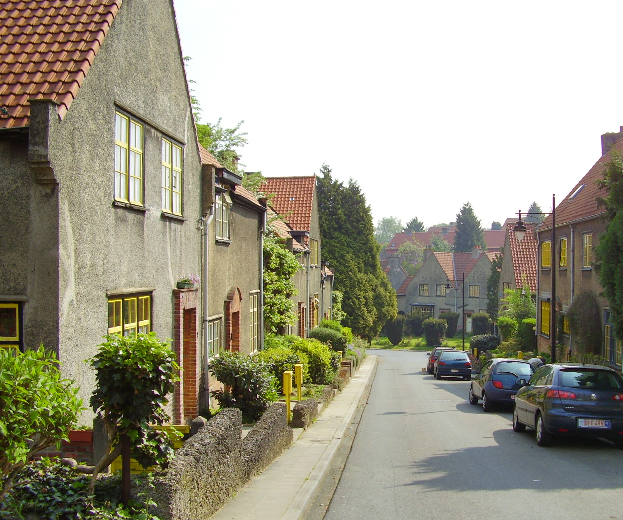 Cité-jardin Le Logis, Watermael-Boitsfort (Bruxelles)